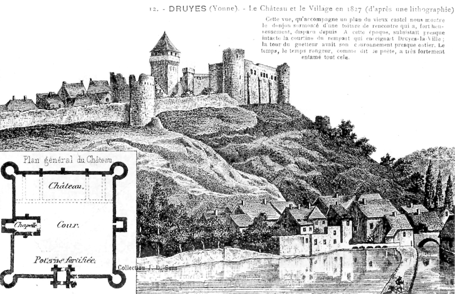 Vue du château de Druyes, Yonne, en 1827